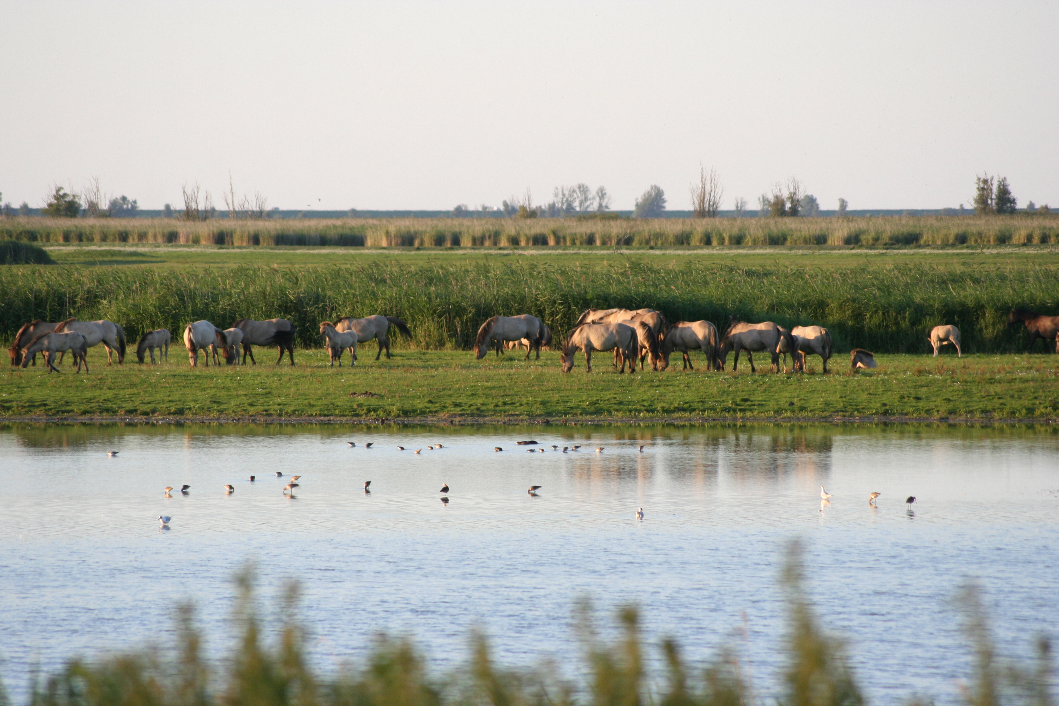 Konik-paarden in de Oostvaardersplassen